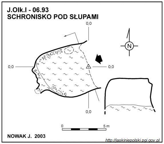 Schronisko pod Słupami - plan